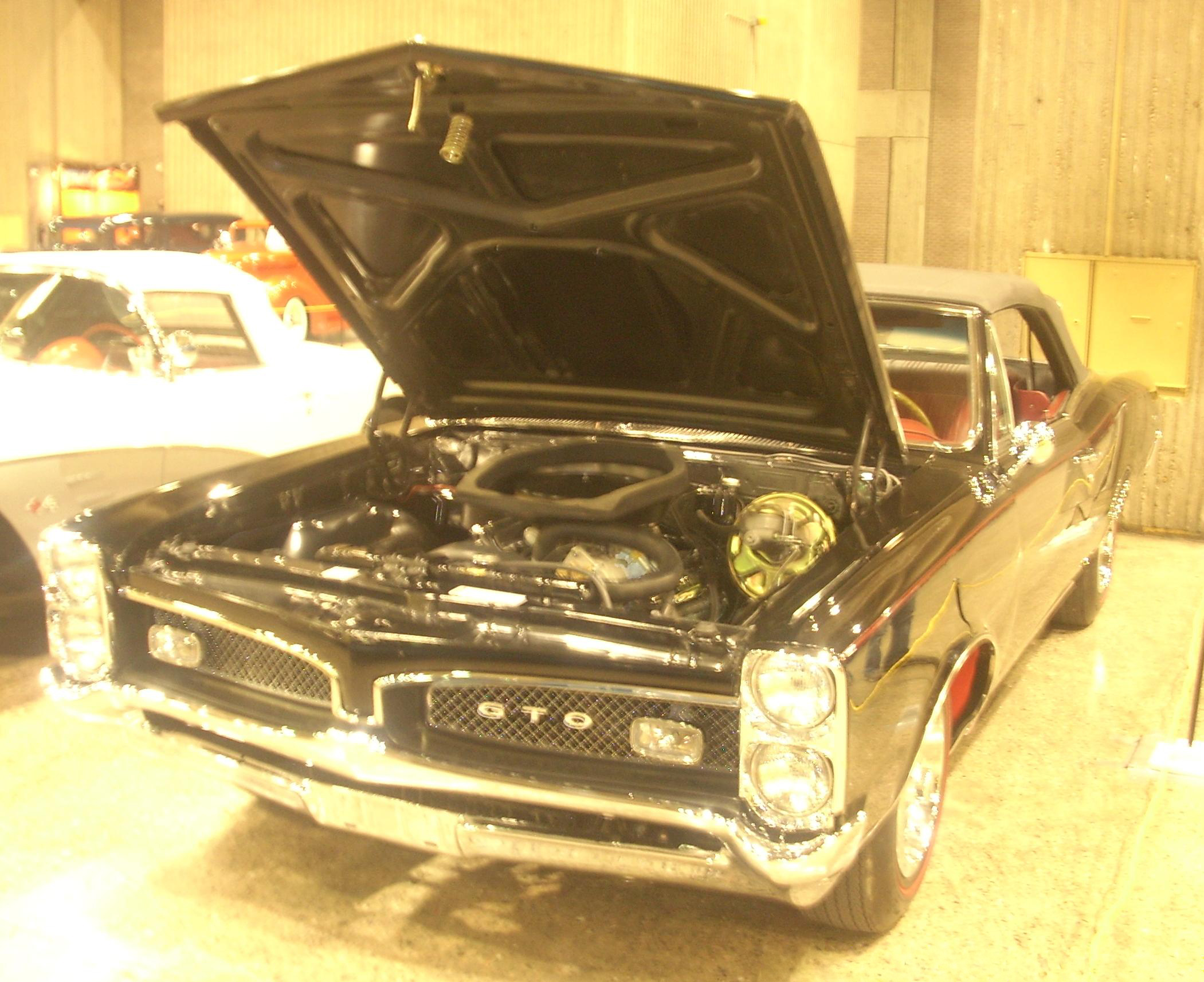 1967 Pontiac GTO photographed at Auto classique Montréal 2008.